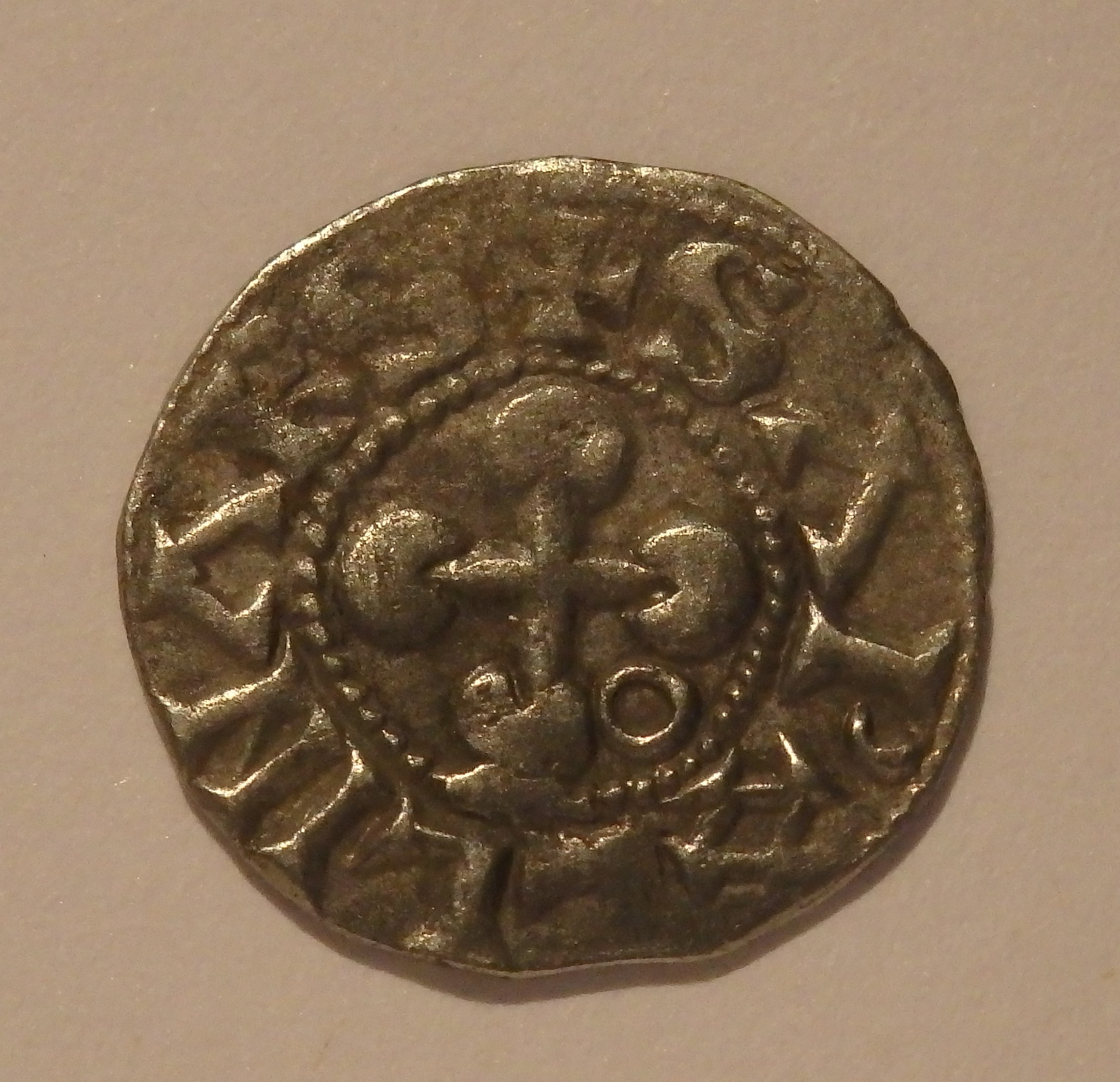 Denar des Bistums Valence, 12. Jahrhundert, Lilie, Poey d'Avant 4690